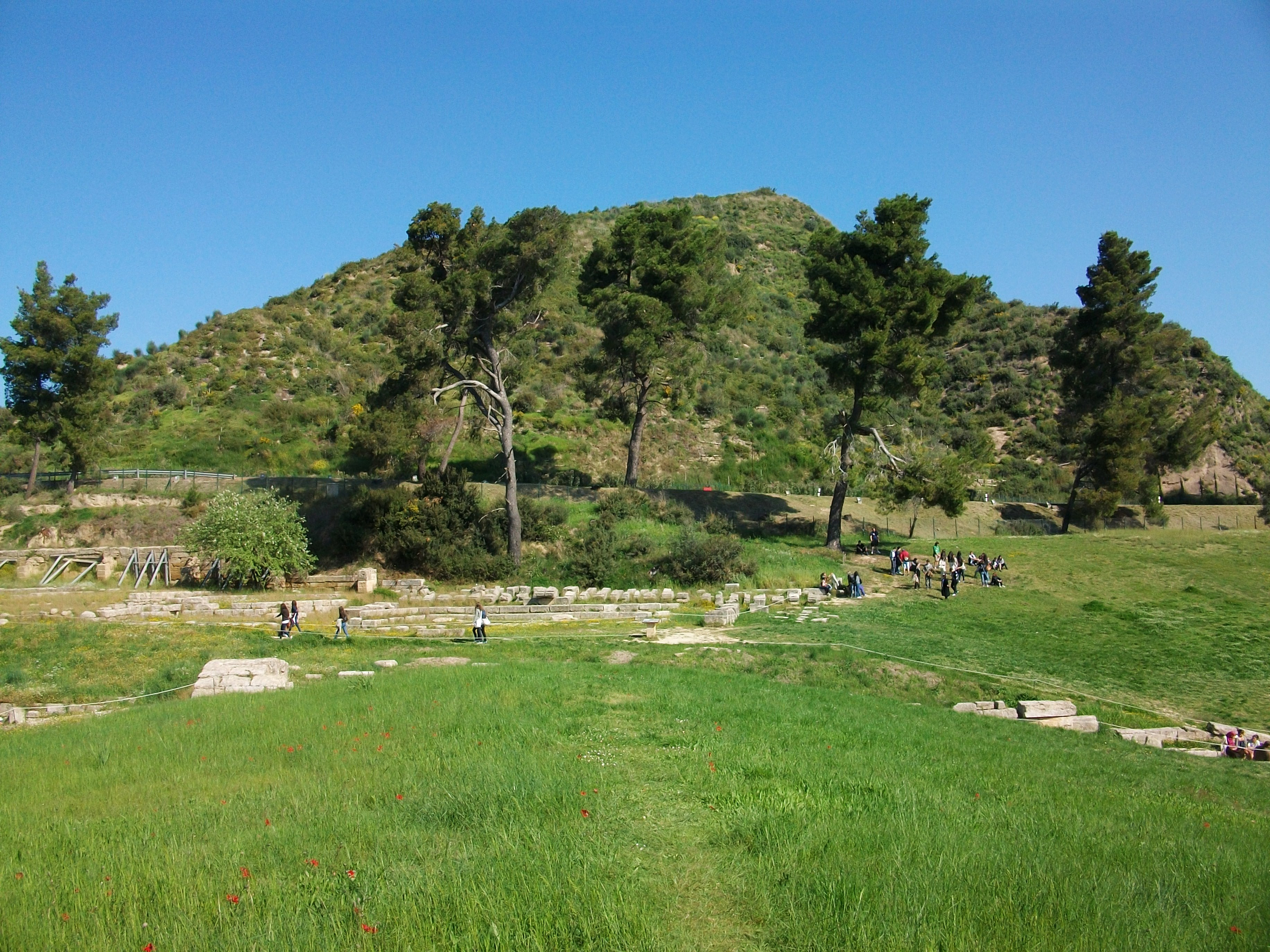 Mont Croni (Kronion), Olímpia.